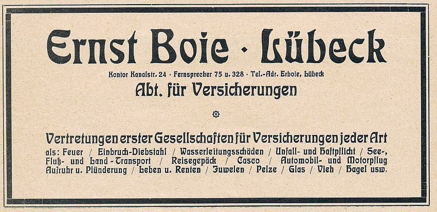 Reklame: Ernst Boie - Lübeck - Abt. für Versicherung